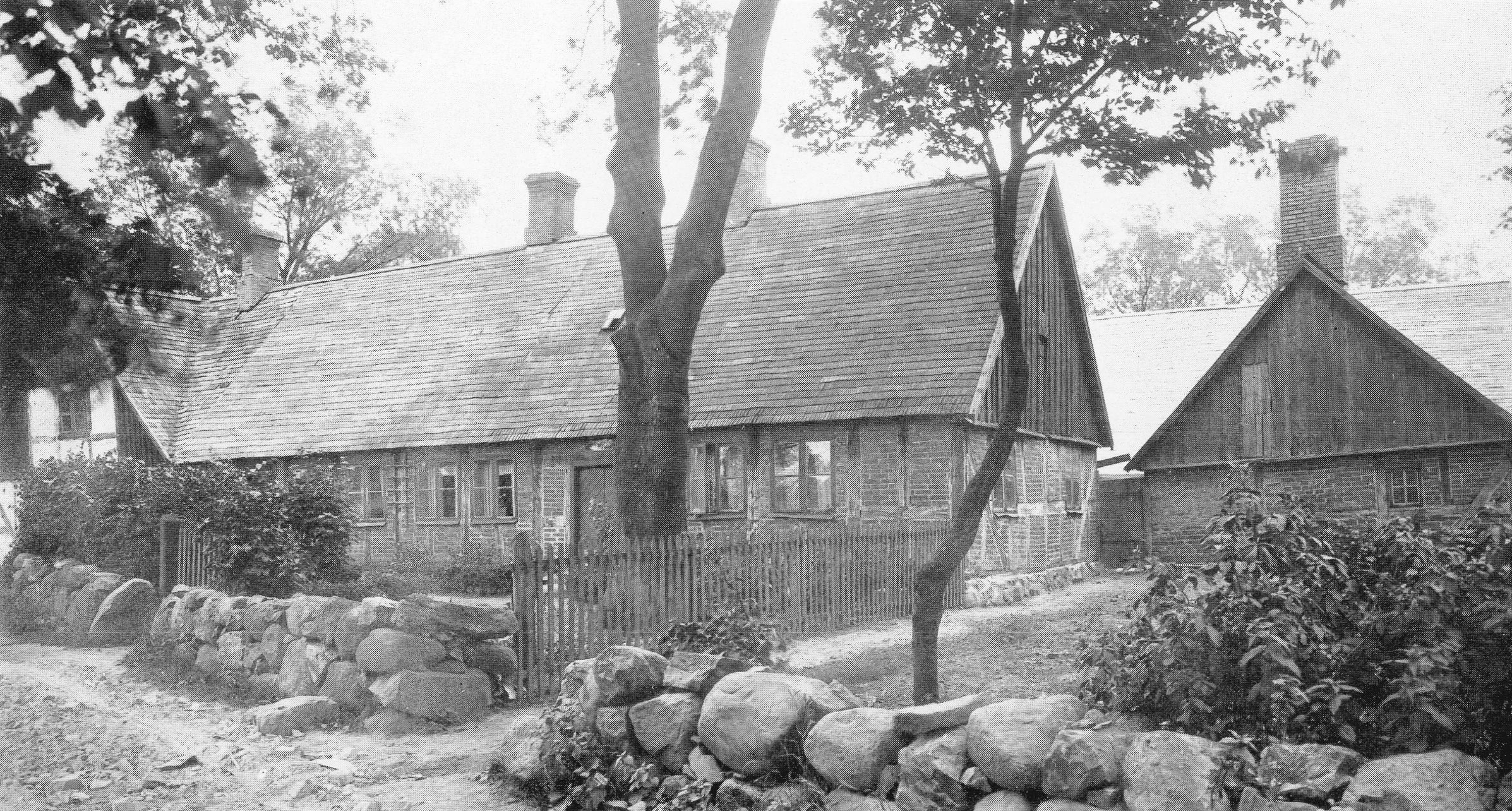 Olshögsgården, belägen på kv Olshög 6 (Olshögsvägen 18) i Lund.